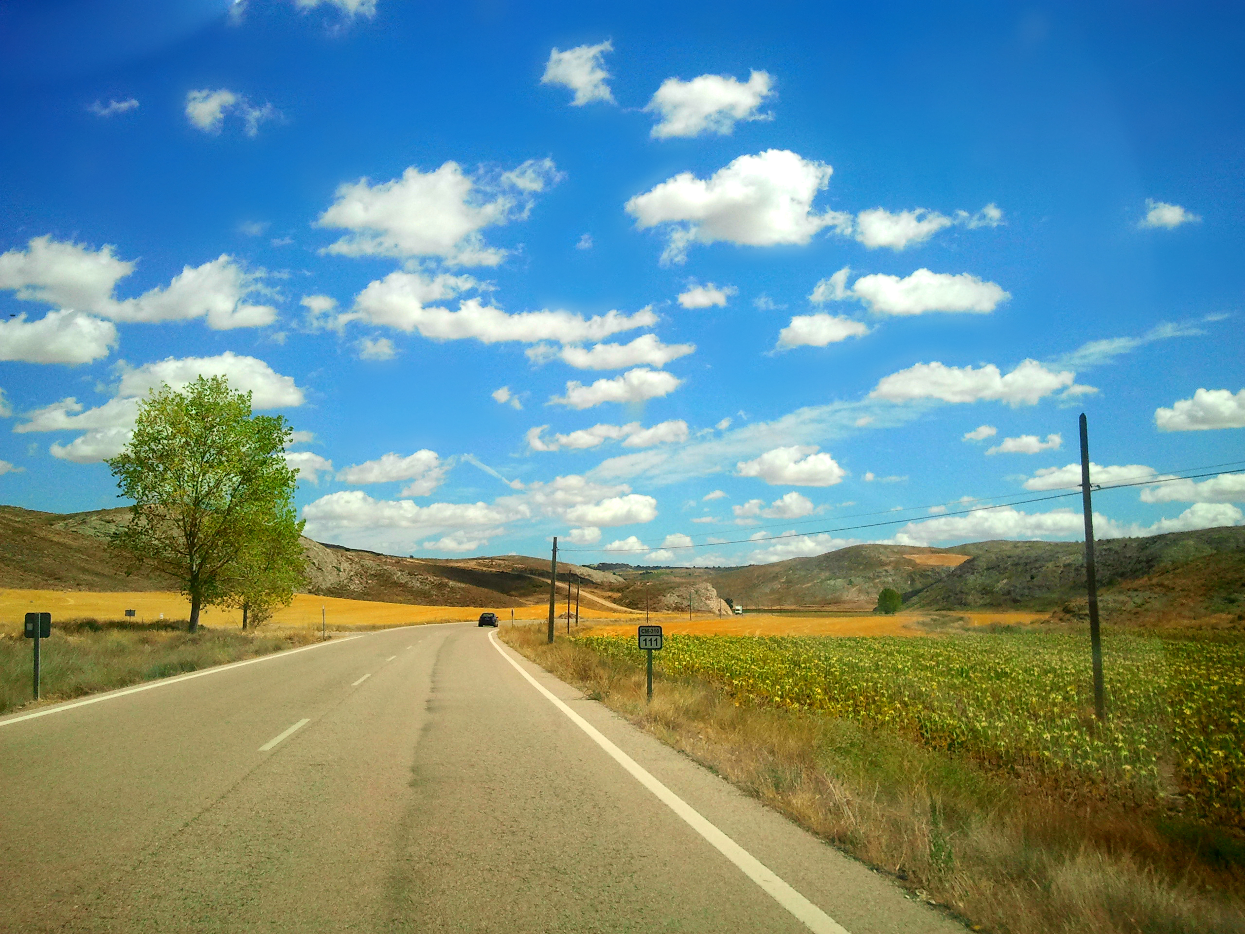 KM 111 de la CM310, Cuenca